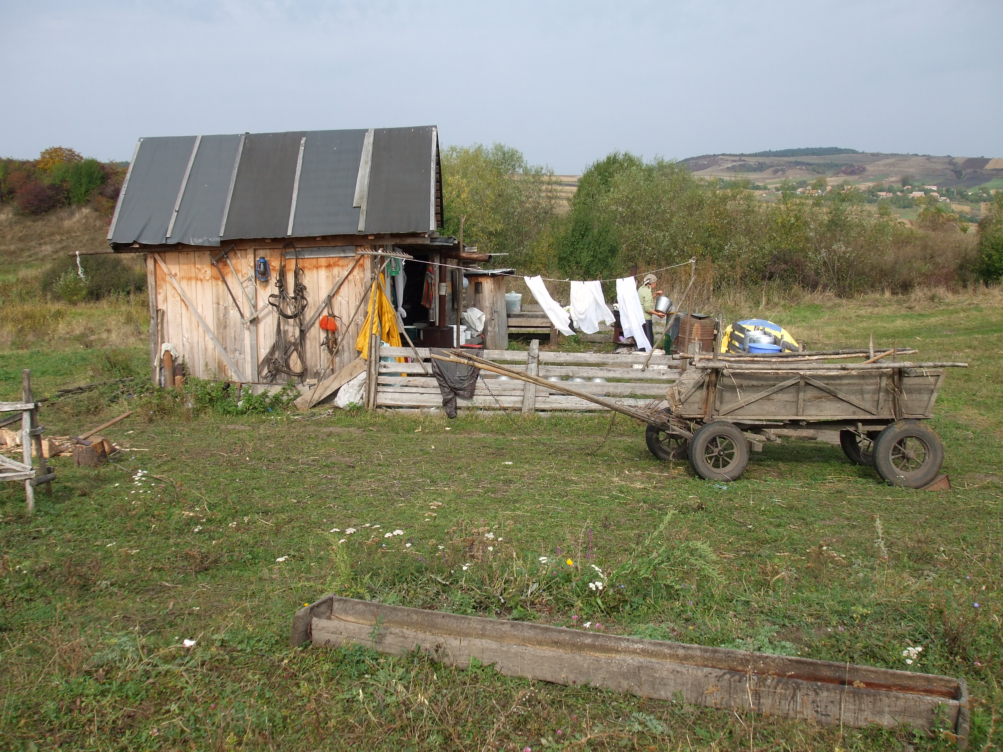 Imagini-Damburile Suatu (Stina ovine)